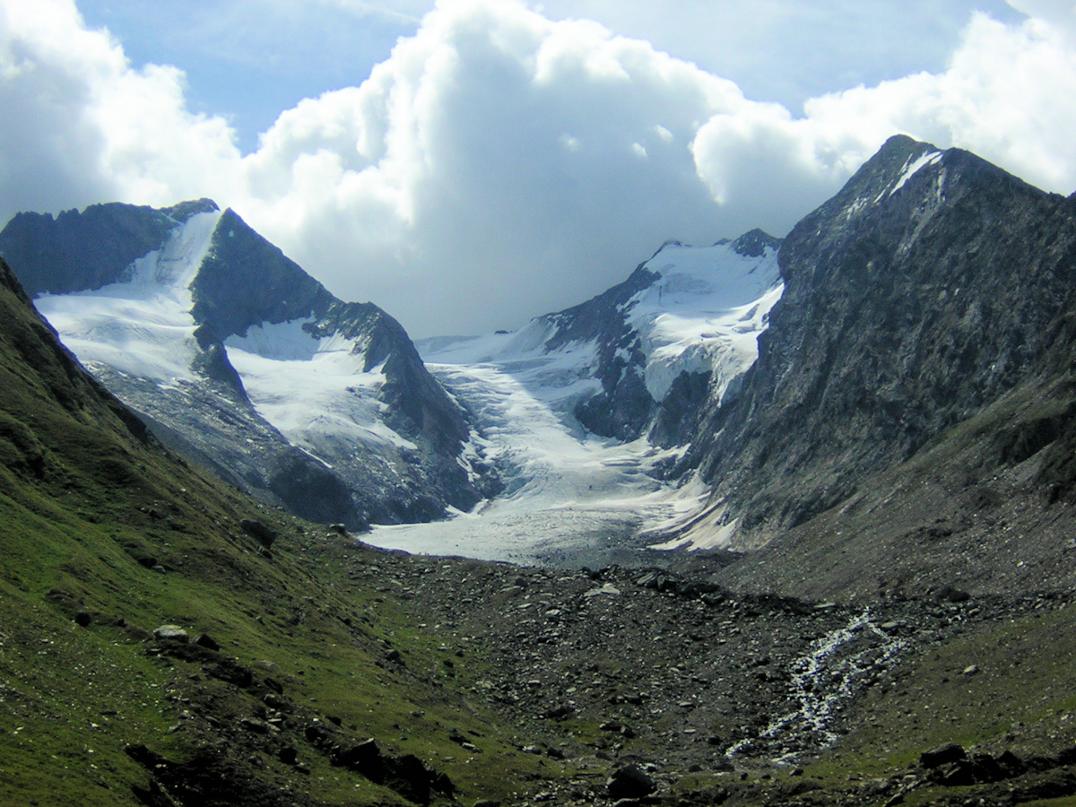 Blick auf den Gaisbergferner im Ötztal. Rundum: Hochfirst (3403m, mit dem Hochfirstferner), Liebenerspitze (3399m), Kirchenkogel (3280m)